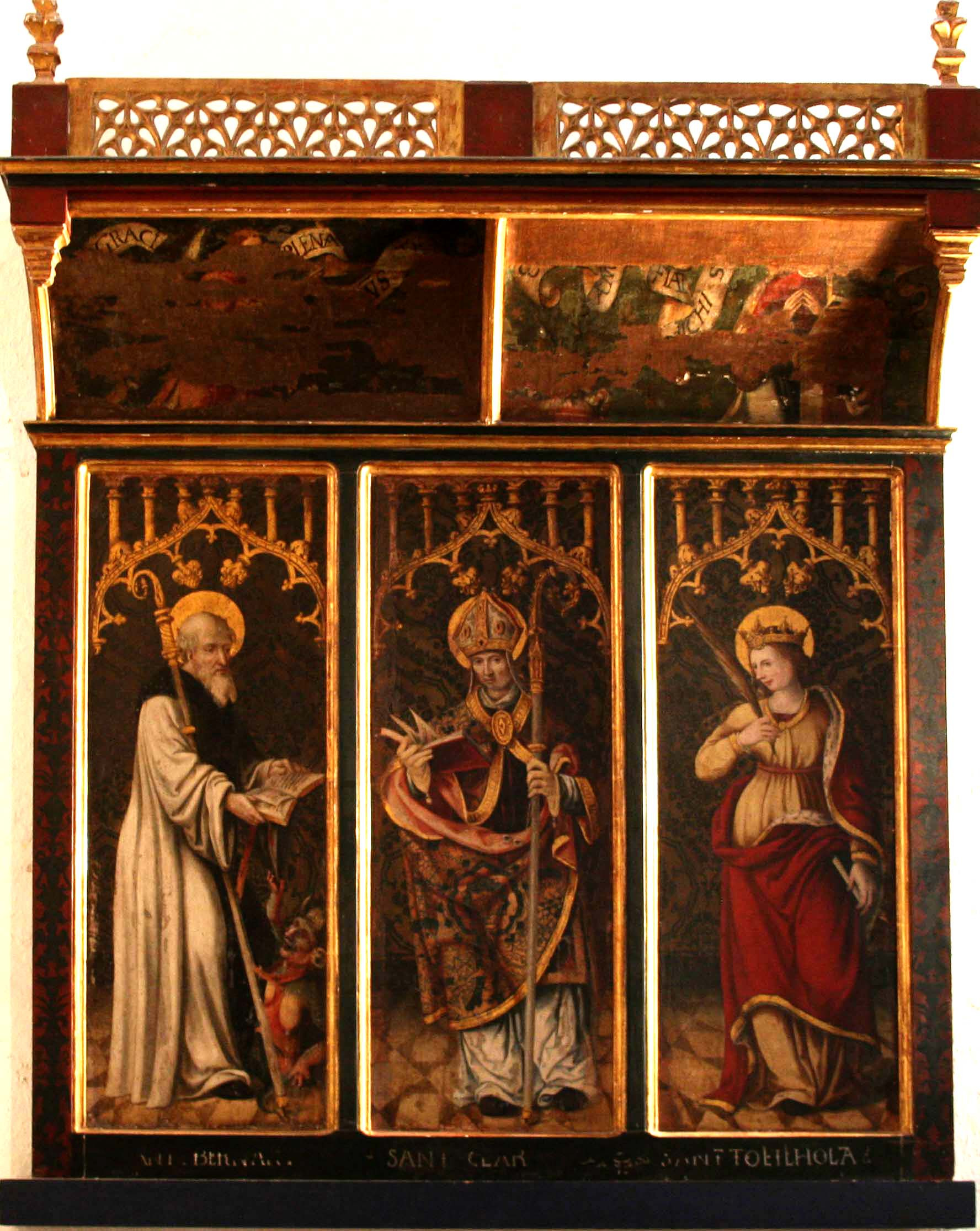 Triptyque du début du XVI° siècle représentant saint Clair, saint Bernard et sainte Théophila dans la collégiale Saint-Pierre de Six-Fours.